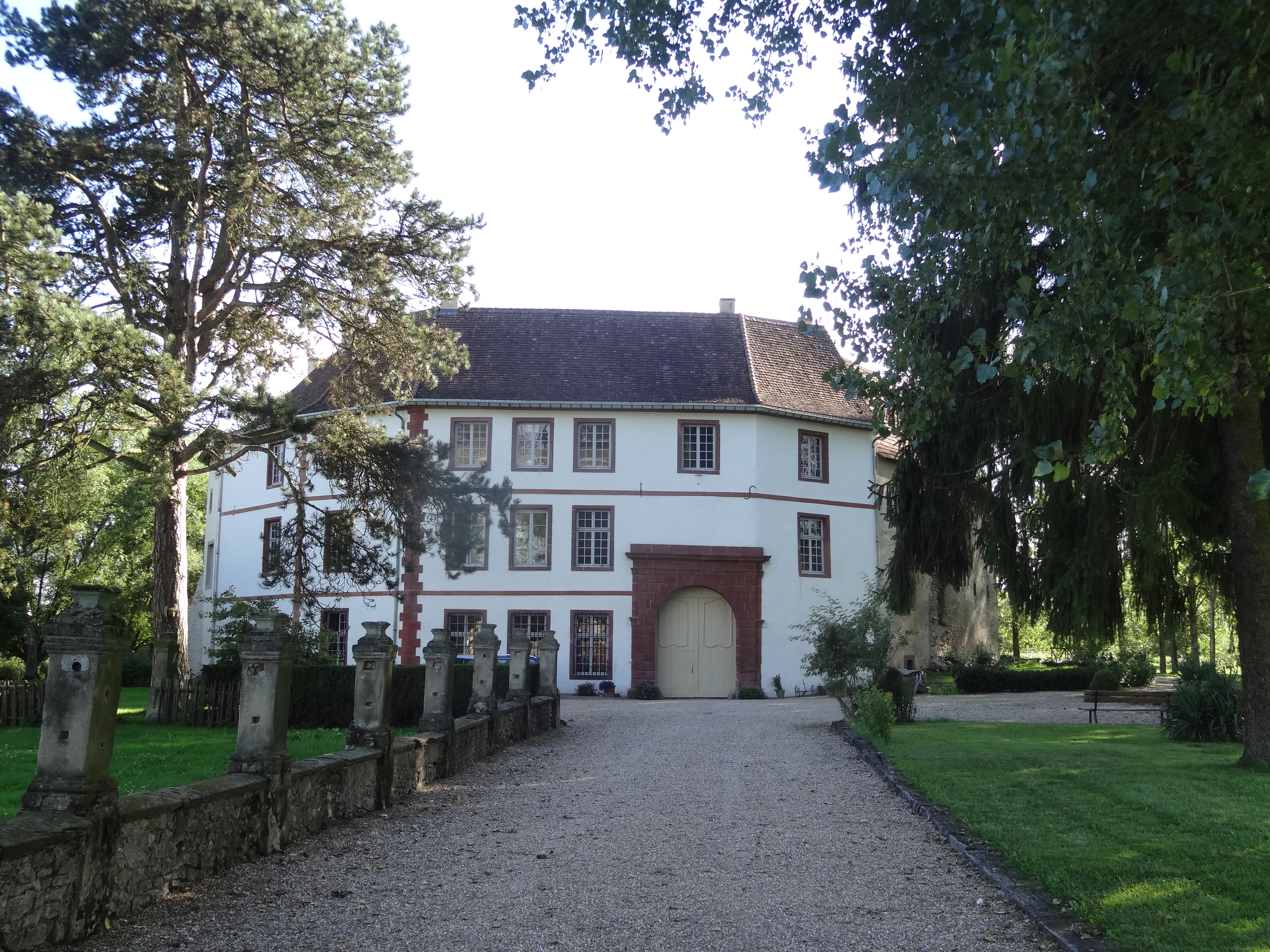 Entrée principale du château Saint-Sixte